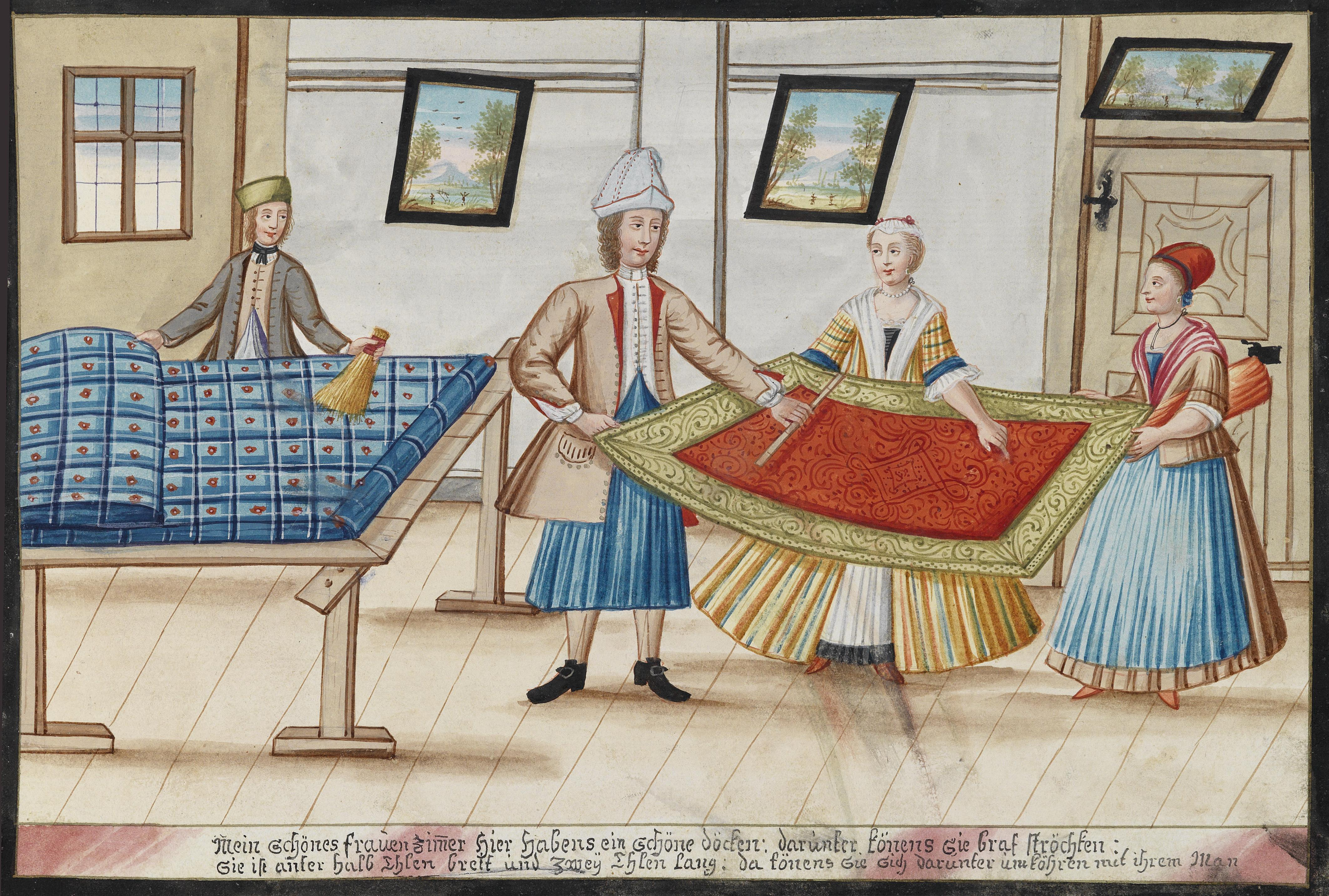 Mein schönes frauenzimmer hier habens ein schöne döcken: darunter könnens sie braf ströchken: Sie ist anter halb Ehlen breit und zwey Ehlen lang: da könens sie sich daunter umköhren mit ihrem Mann (Deckenherstellung in Arbeitstracht; Verkaufsgespräch); selbst gefertigte Seite aus dem Musterbuch und Privatalbum des Wiener Deckenmacher-Gesellen Johann Franz Hörmannsperger, 1736